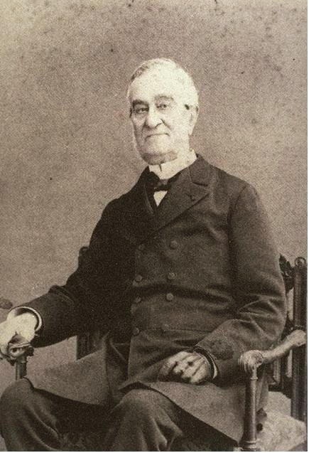 Portrait photographie d'Adolphe Goupil (1806-1893), cofondateur de Goupil & Cie (Paris)